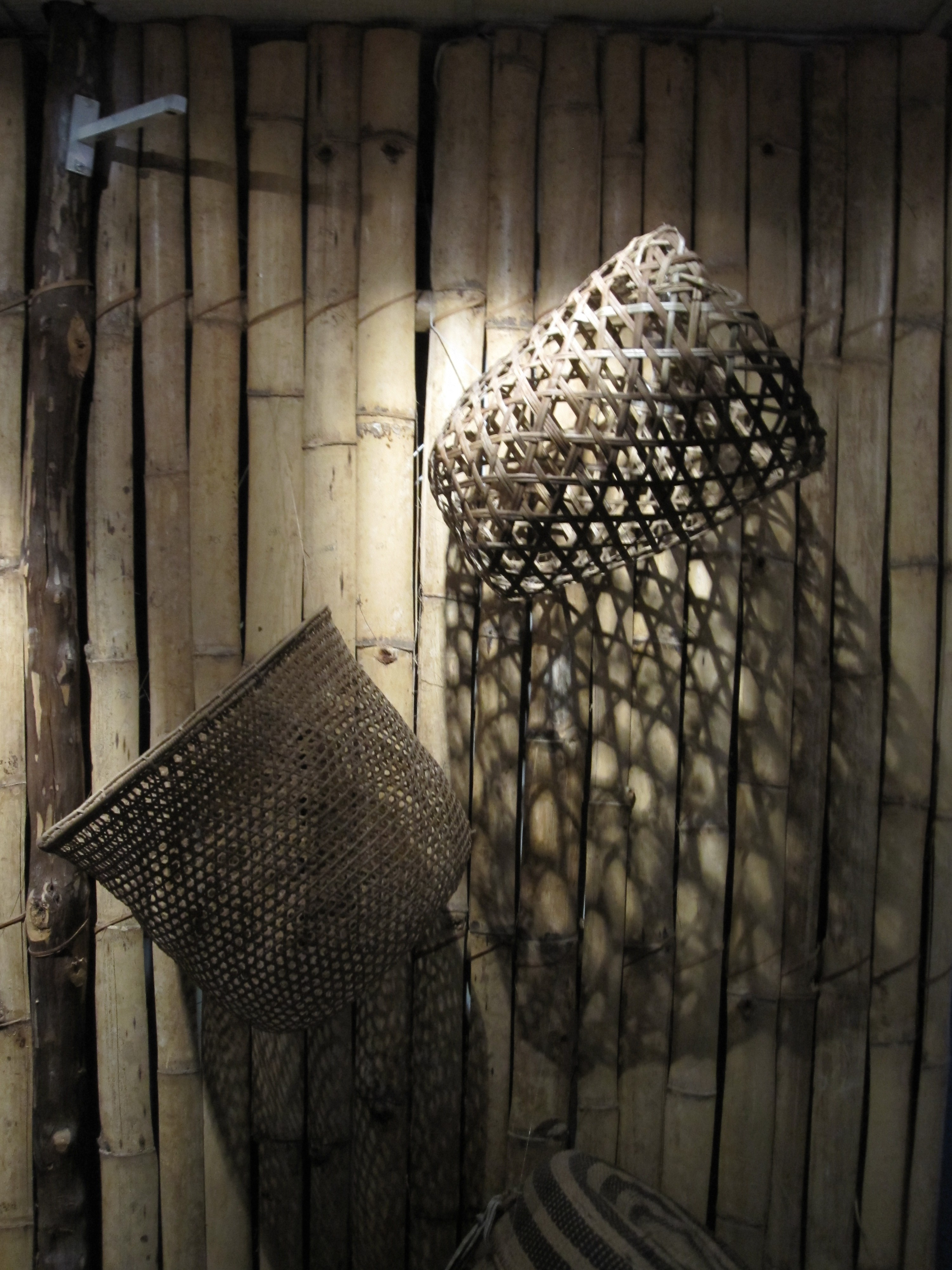 Shuar baskets